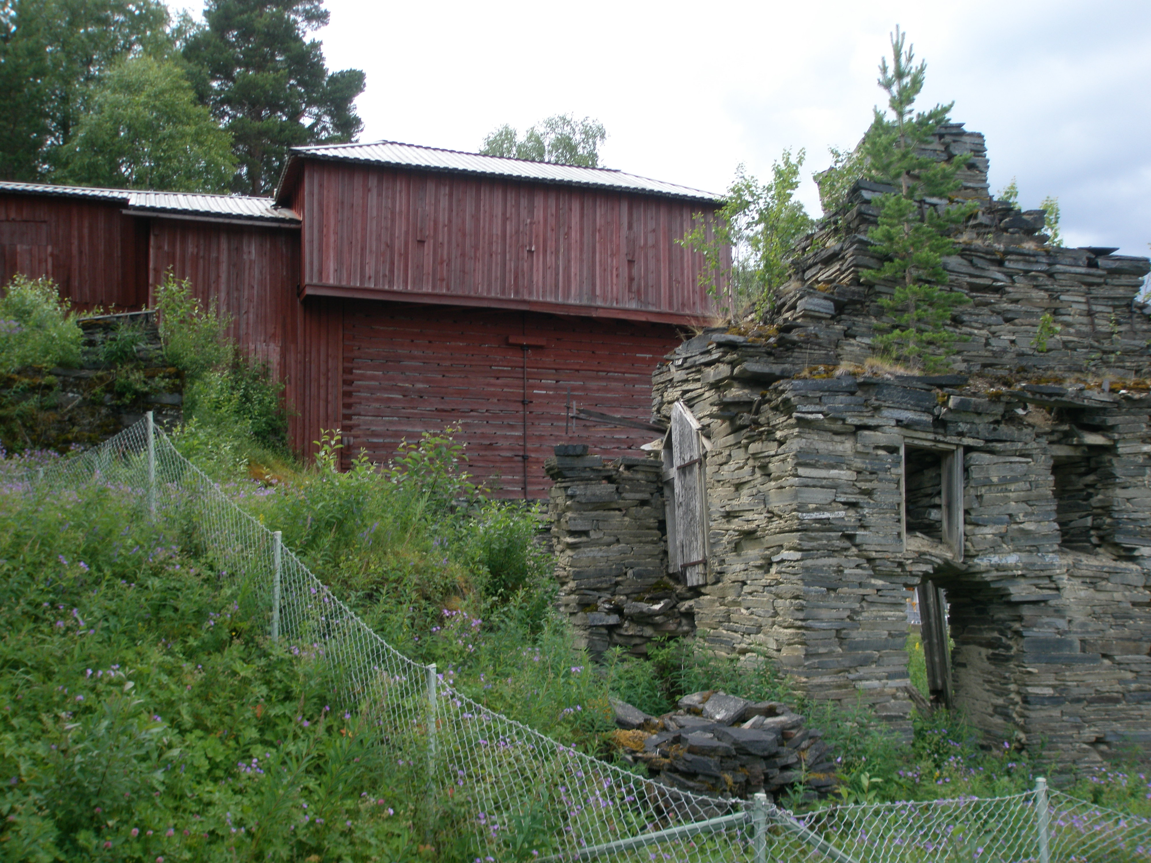 Järnbruksruin i Rönnöfors, Offerdals socken, Krokoms kommun, Jämtland, Sverige.